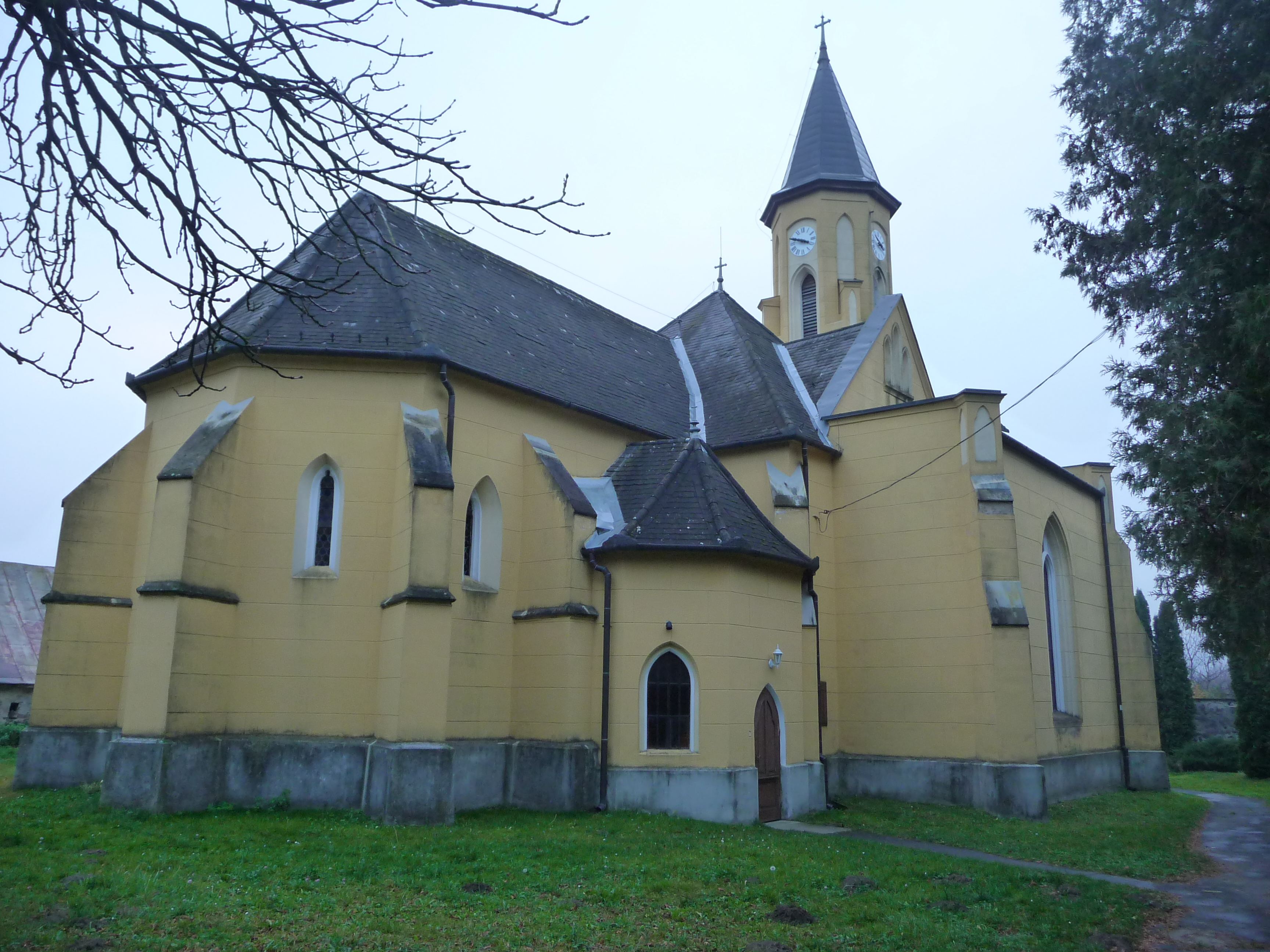 Az alsózsidi templom kelet-északkeletről, Várvölgy